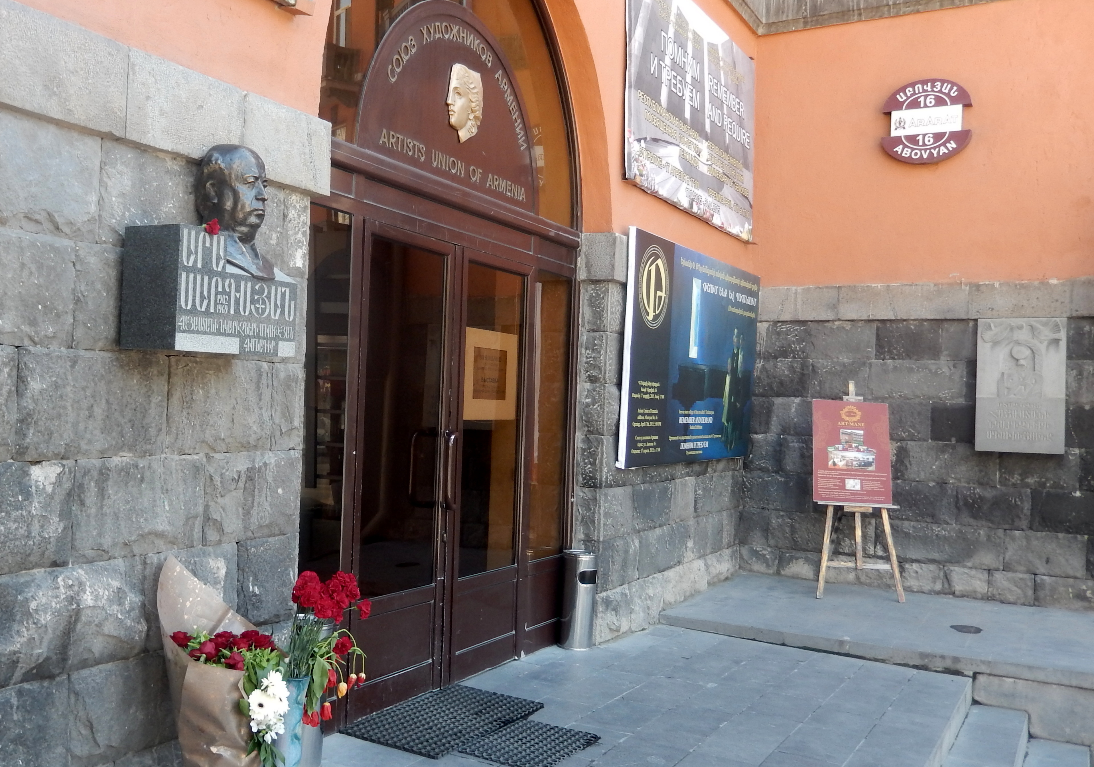 Արա Սարգսյանի դիմաքանդակը Հայաստանի նկարիչների միության շենքի մուտքի մոտ 6/178.3.4